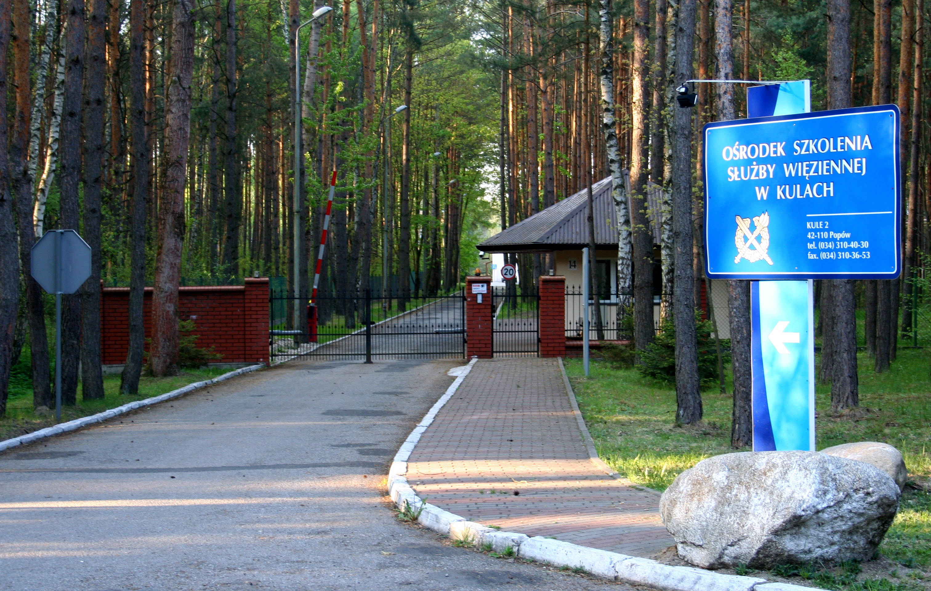 Wjazd na teren ośrodka szkolenia służby więziennej w Kulach, woj. śląskie